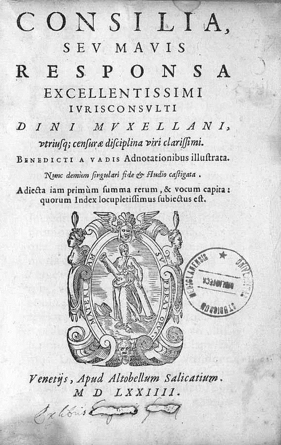 Frontespizio